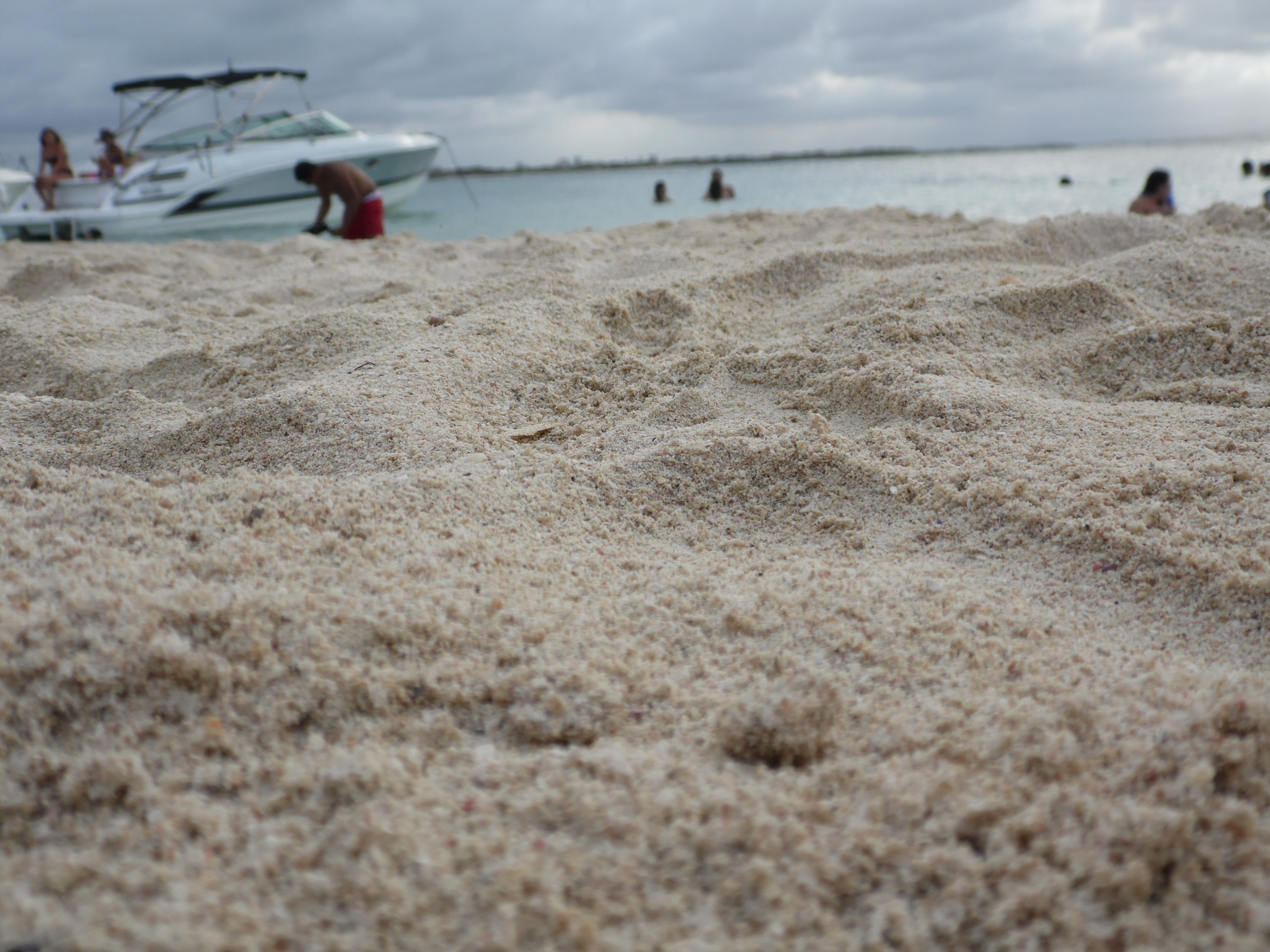 Paque Nacional Morrocoy Cayo Paiclá paraiso terrenal